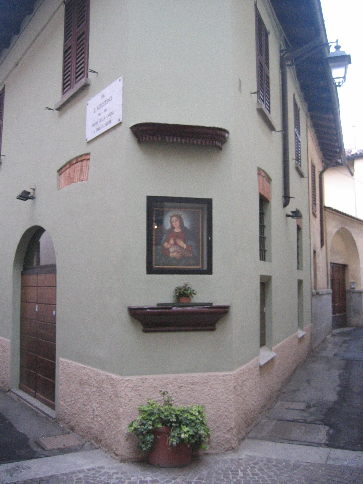 La Madonna del Latte all'angolo tra via Munipio e via Sant'Agostino a Treviglio